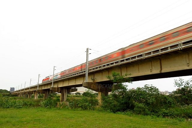 台鐵縱貫線頭前溪橋 was filmed by TDCKW on 20181021